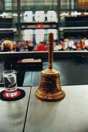 So sieht der Plenarsaal des Bundestages vom Podium des Präsidiums aus, Bimmels Zustimmung zur Verwendung ("bingbong!") liegt vor.